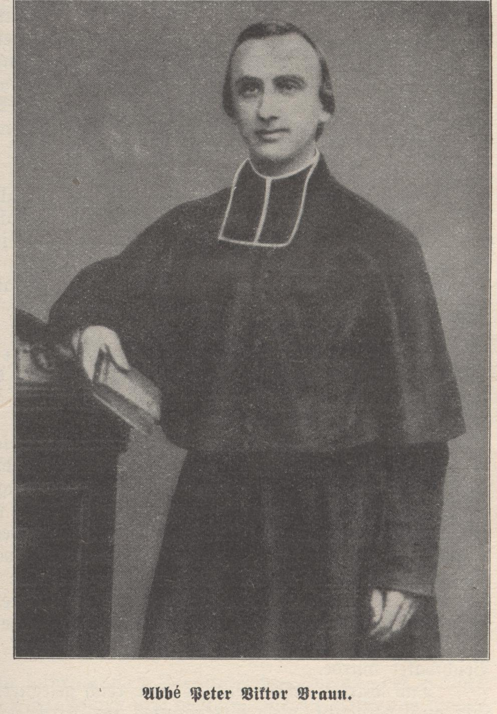 Pfarrer Peter Vikor Braun, Diözese Metz, Lothringen, Ordensstifter